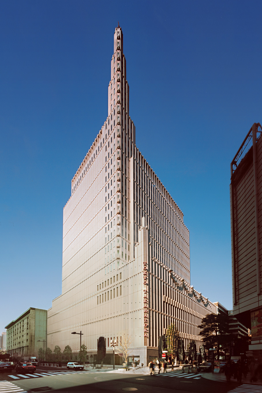 東宝株式会社ビル